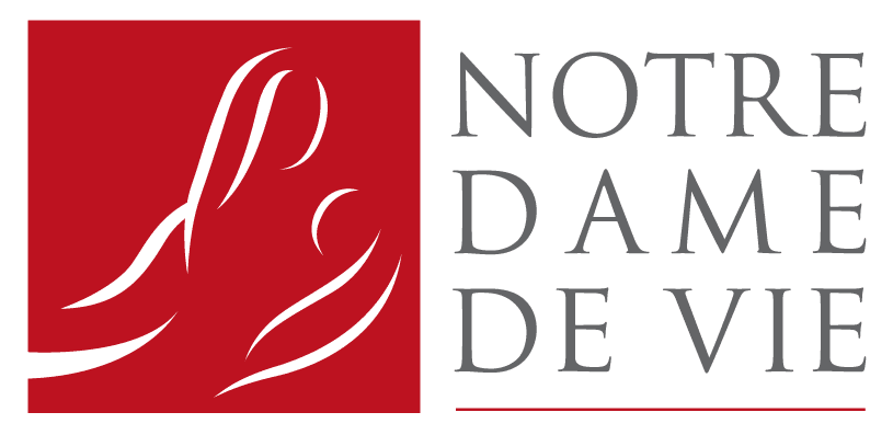 Logo de l'Institut Notre-Dame de Vie